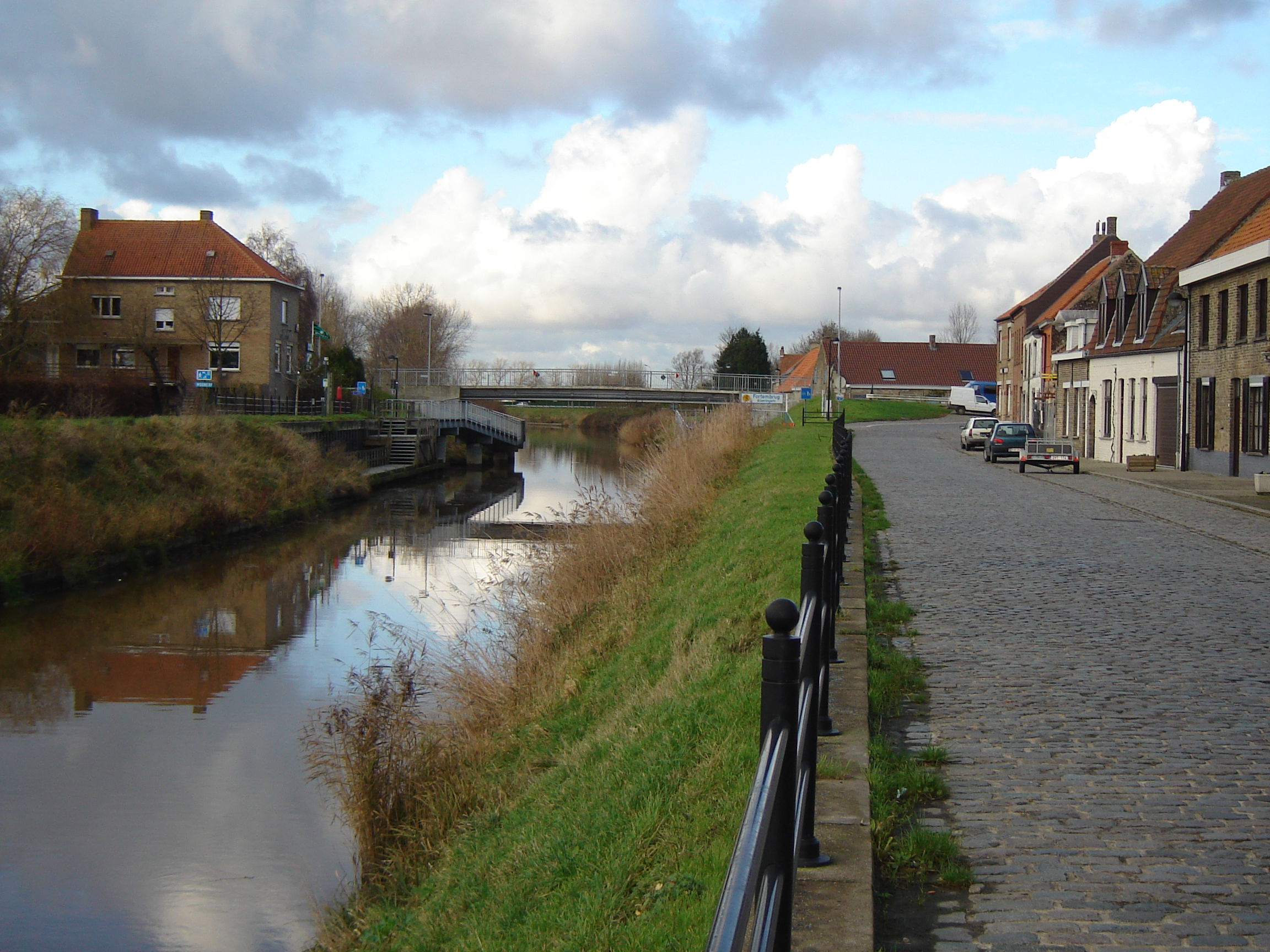 Hamlet of Fortem in Alveringem, West-Flanders, Belgium. "Fortembrug", bridge over the Lovaart